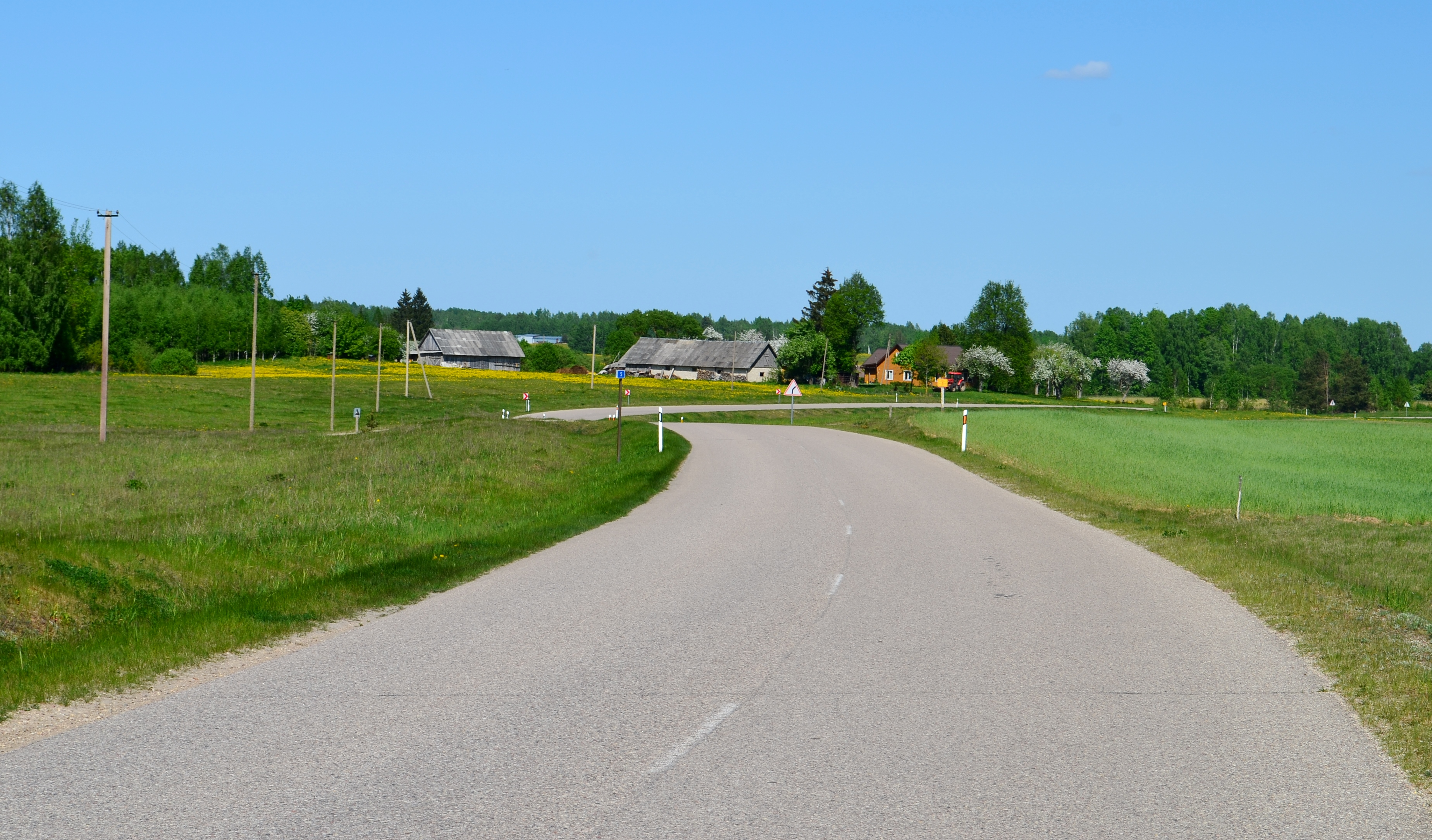 Pabarai, Balninkų sen., Molėtų raj.